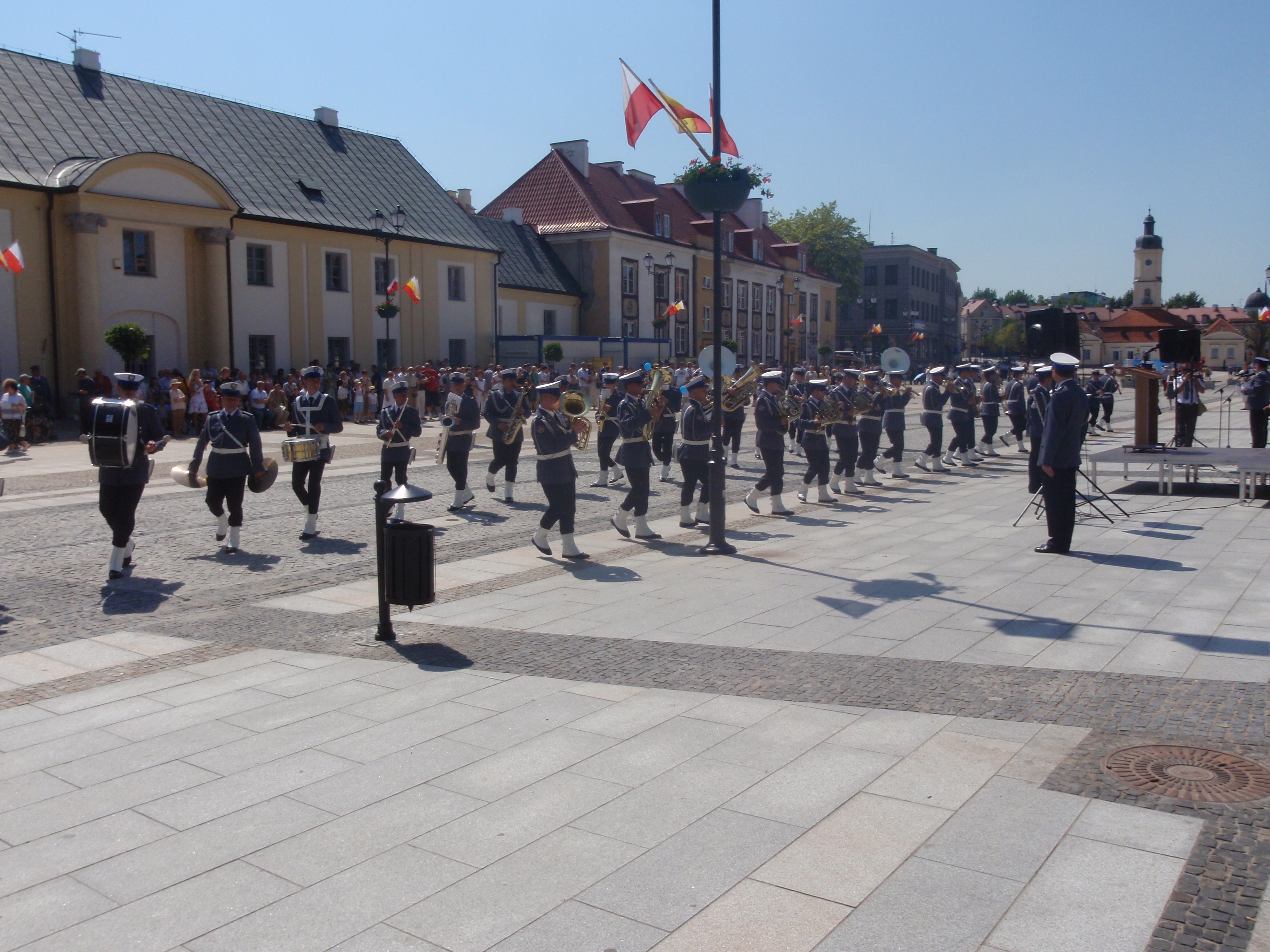 koncert orkiestry policyjnej na Święcie Policji w Białymstoku